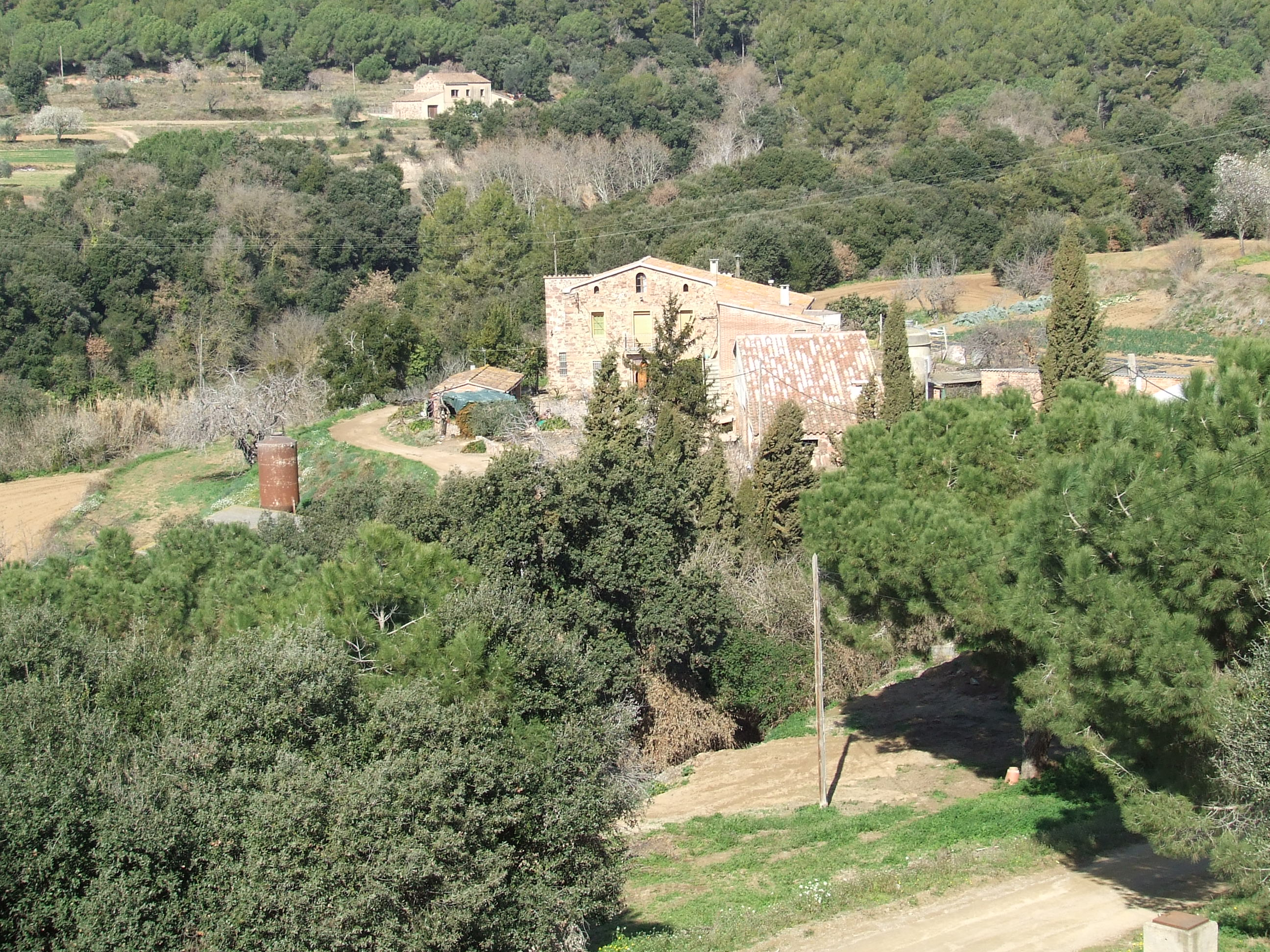 Can Jeroni del Veïnat (Bigues, Bigues i Riells, Vallès Oriental)